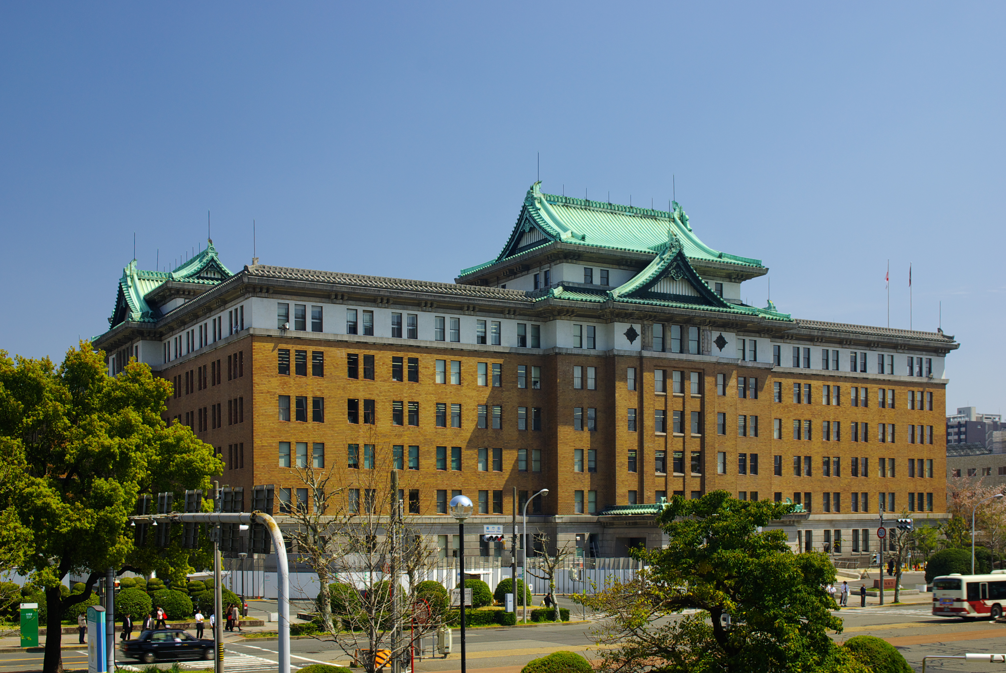 鴟尾を載せた愛知県庁